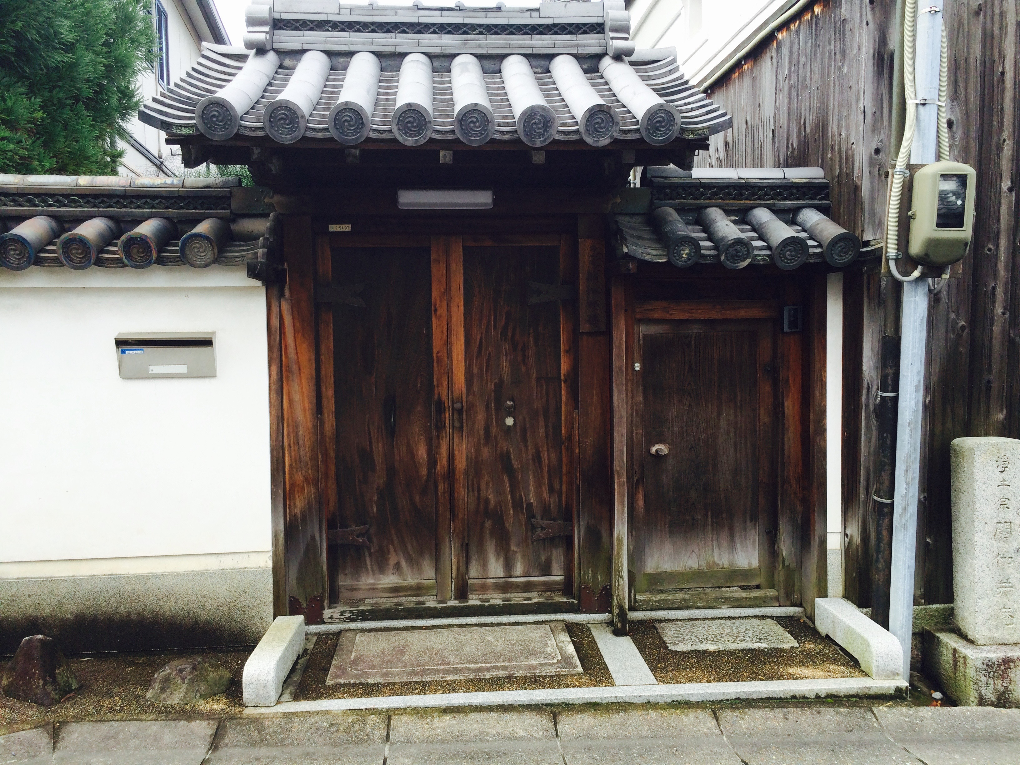 奈良高畑町 閼伽井庵